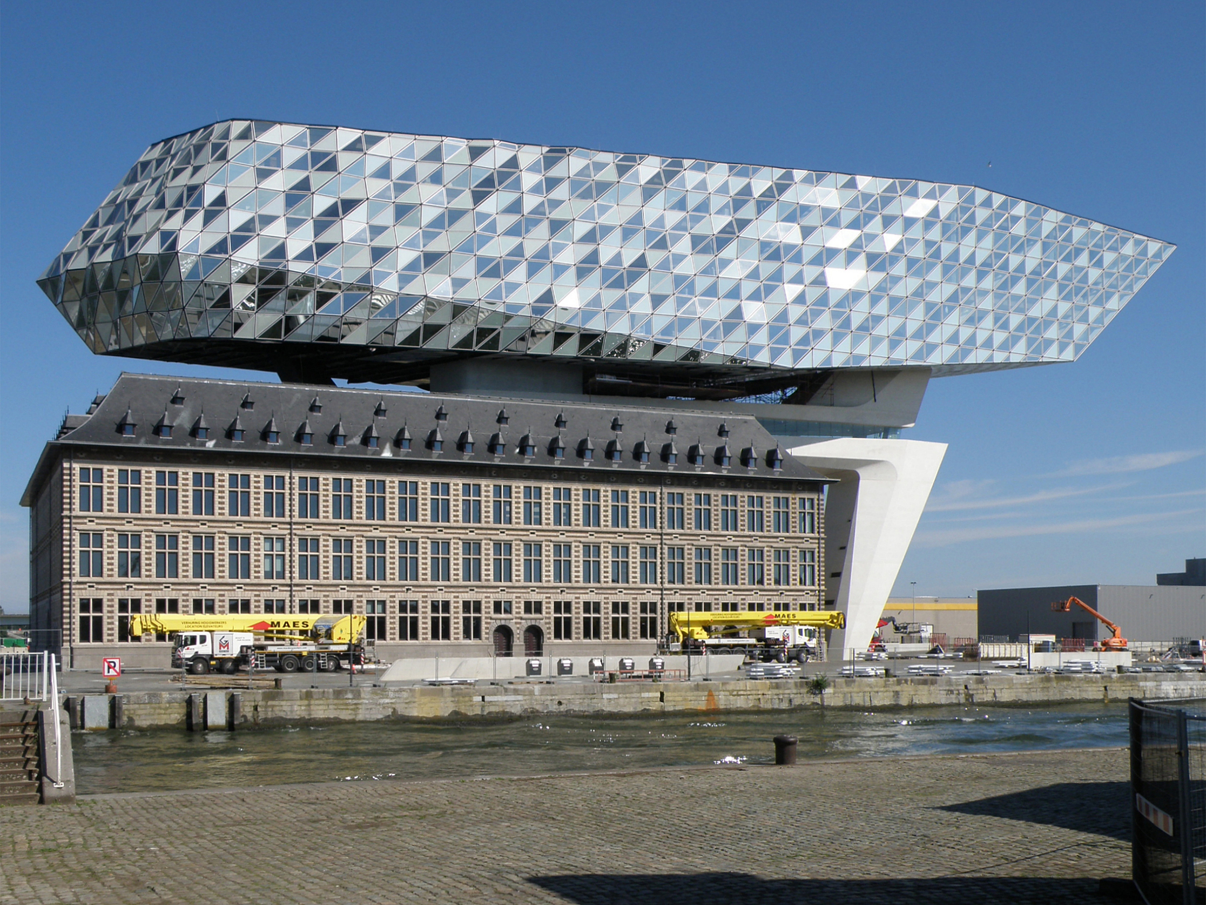 Antwerpen (België). Havenhuis, aan het Kattendijkdok.